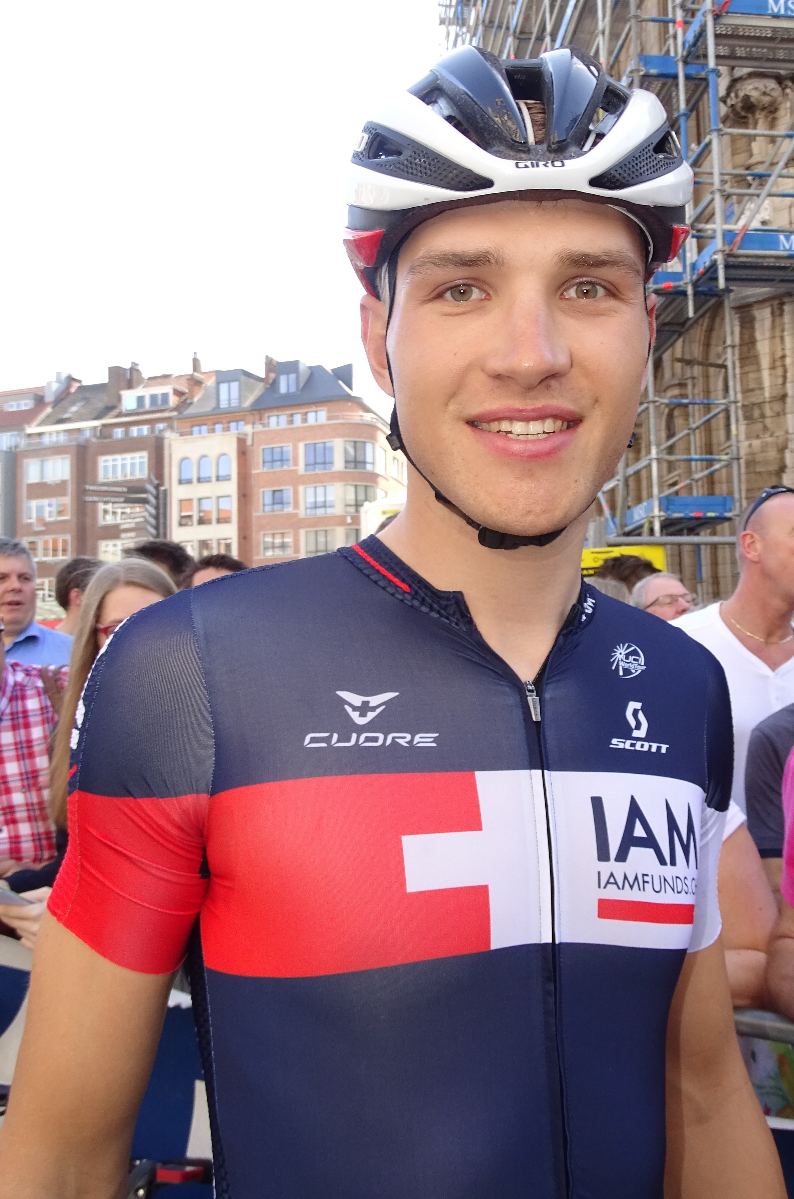 Reportage réalisé le mercredi 15 avril à l'occasion du départ de la Flèche brabançonne 2015 à Louvain, Belgique.